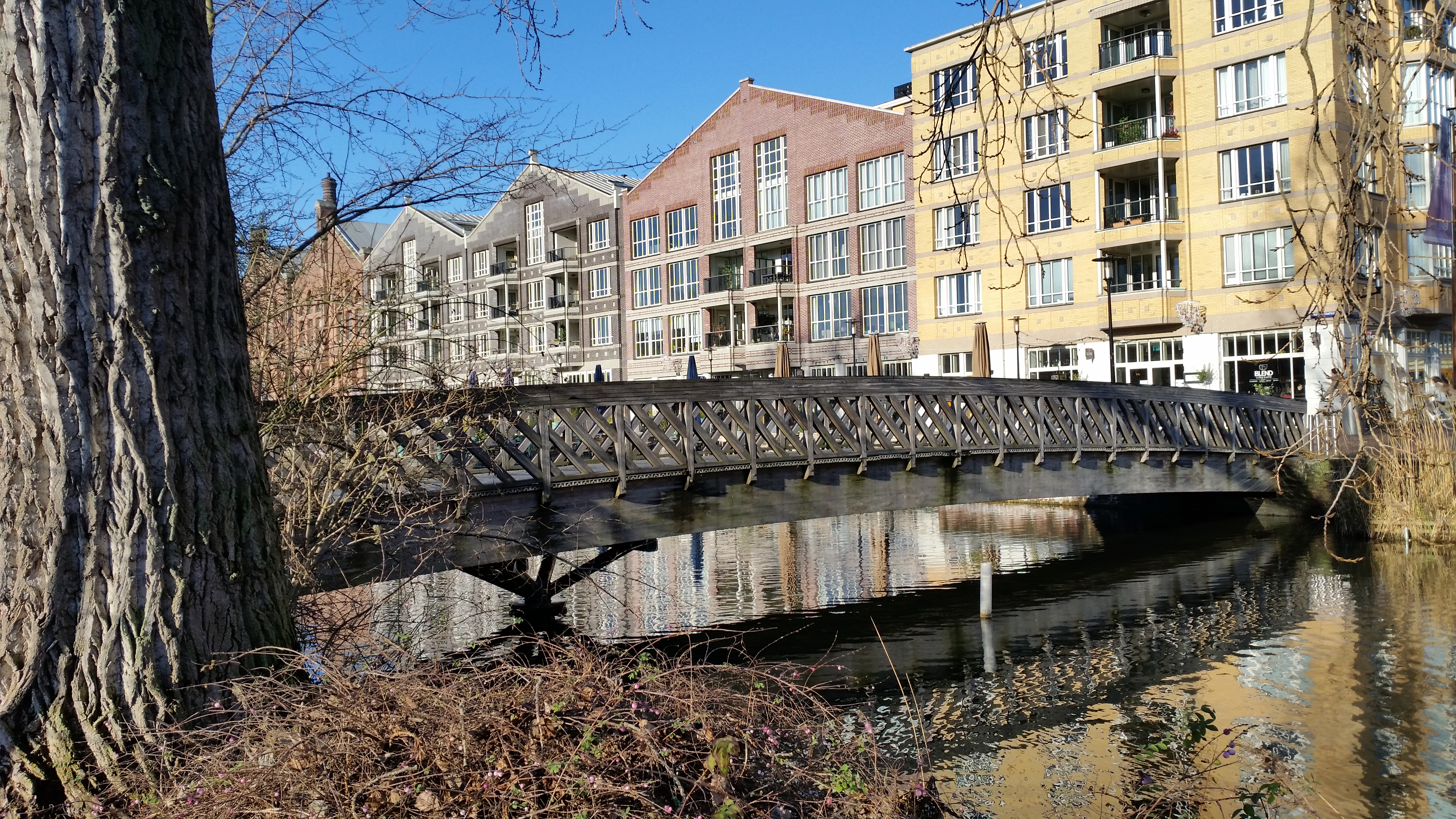 Zijaanzicht van Brug 2359 (in Amsterdam) gezien vanaf de Linnaeuskade